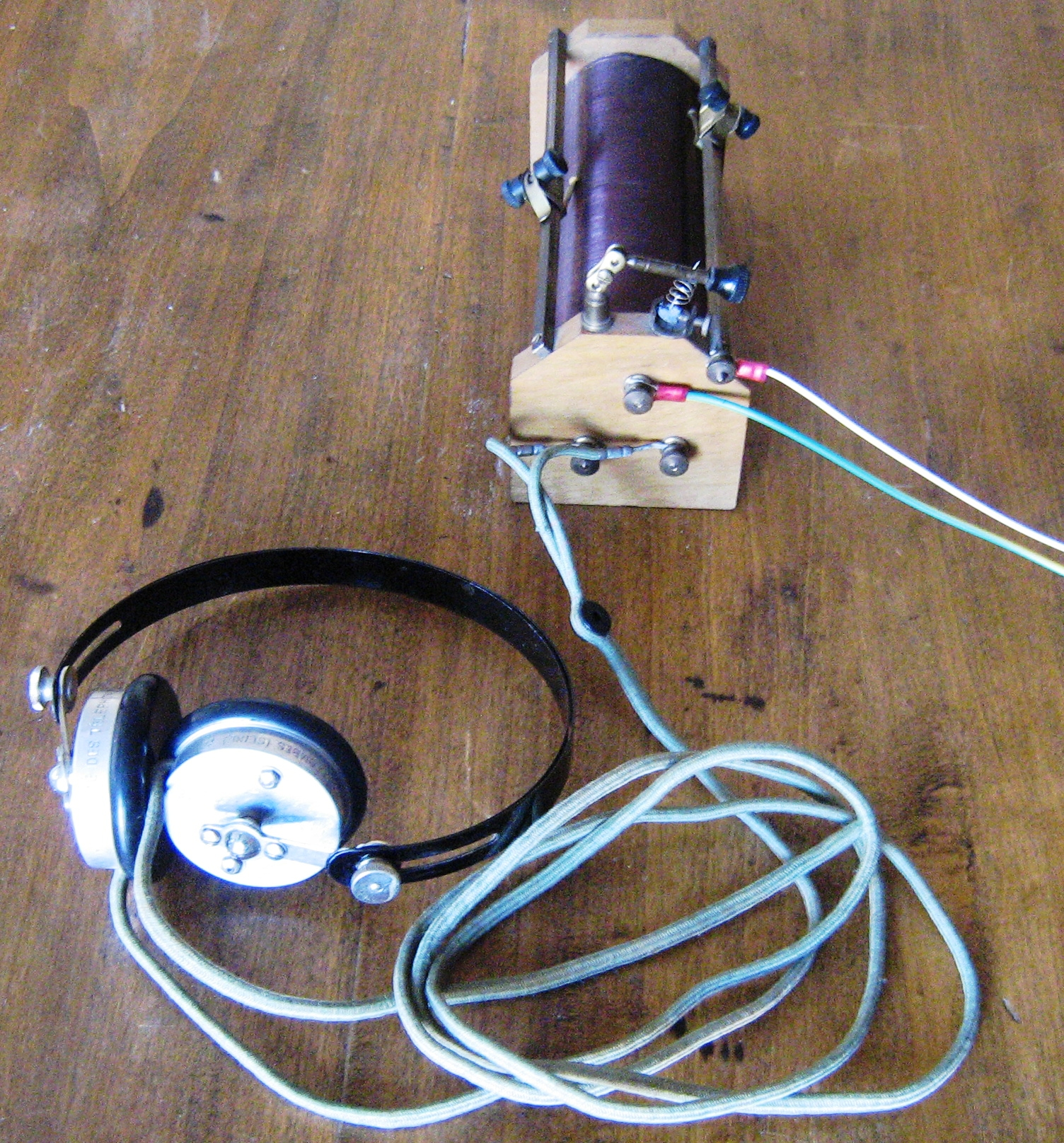 Poste a galène Oudin pour l'écoute de la bande 100 kHz à 6 MHz (45 à 3000 mètres). Le poste Oudin est plus pour l'écoute ordinaire, utilisable par le grand public, une plus grande puissance du circuit d'accord inductance-condensateur arrive a l'écouteur, d’une utilisation très simple, aussi peu coûteux que possible, destiné uniquement pour la radiodiffusion des grandes ondes (GO ou LW), de la radiodiffusion des petites ondes (PO ou MW), si l'on dispose d'une antenne radioélectrique suffisamment développée, la réception nocturne des grands postes européens est possible (portée jusqu’à 2000 km). Le poste Oudin est le plus facile à construire. Le poste Oudin ne permet plus l’écoute de la radiodiffusion dans les bandes décamétrique ou les signaux de dix, quinze, vingt postes d’émission sont perçu au même instant sur le même réglage.